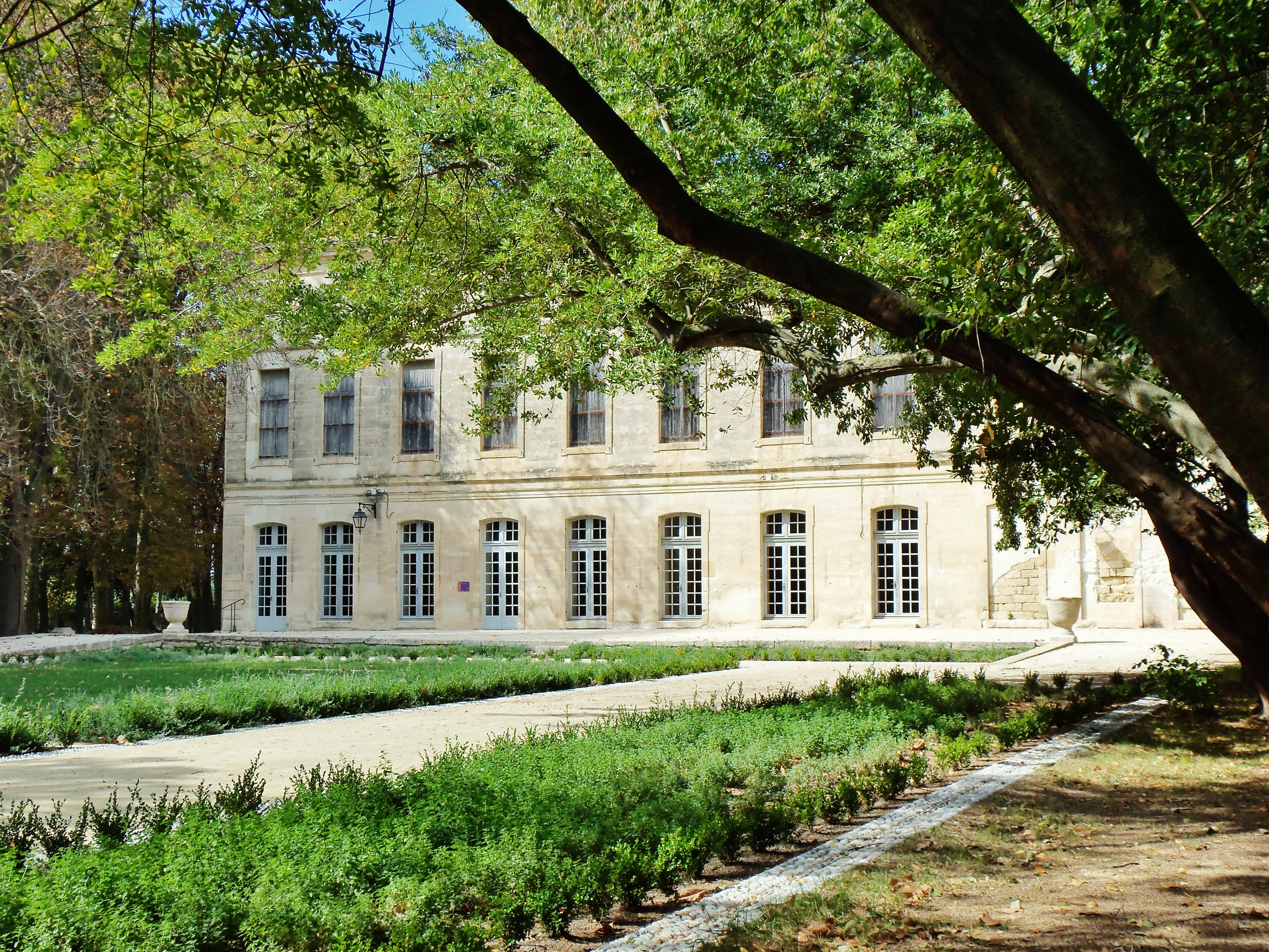 Cette façade arrière du château permet d'admirer la partie du jardin à la française